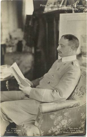 Bildnis von Prinz Johann Georg von Sachsen in seinem Arbeitszimmer